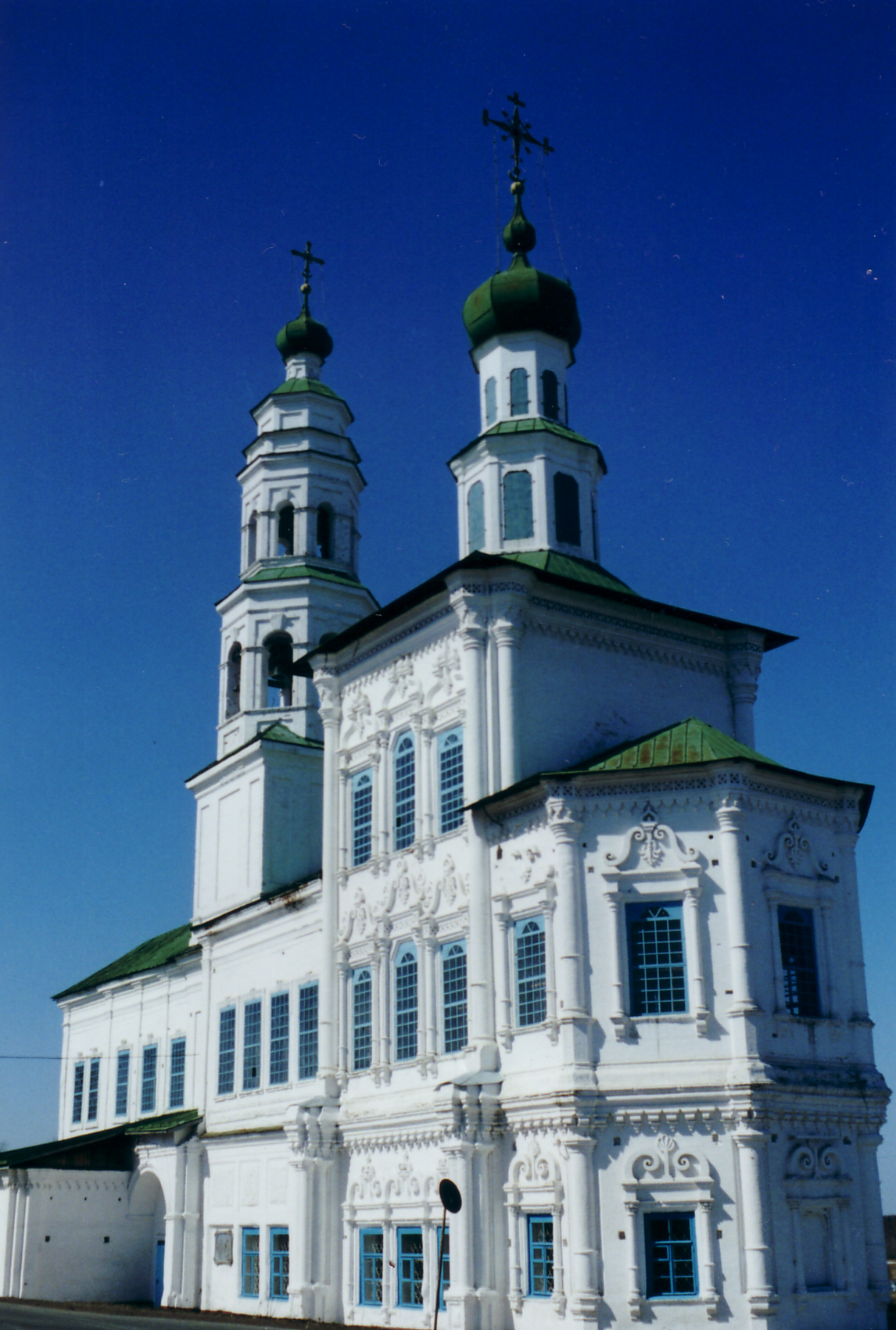 Церковь Иоанна Предтечи. Город Соликамск